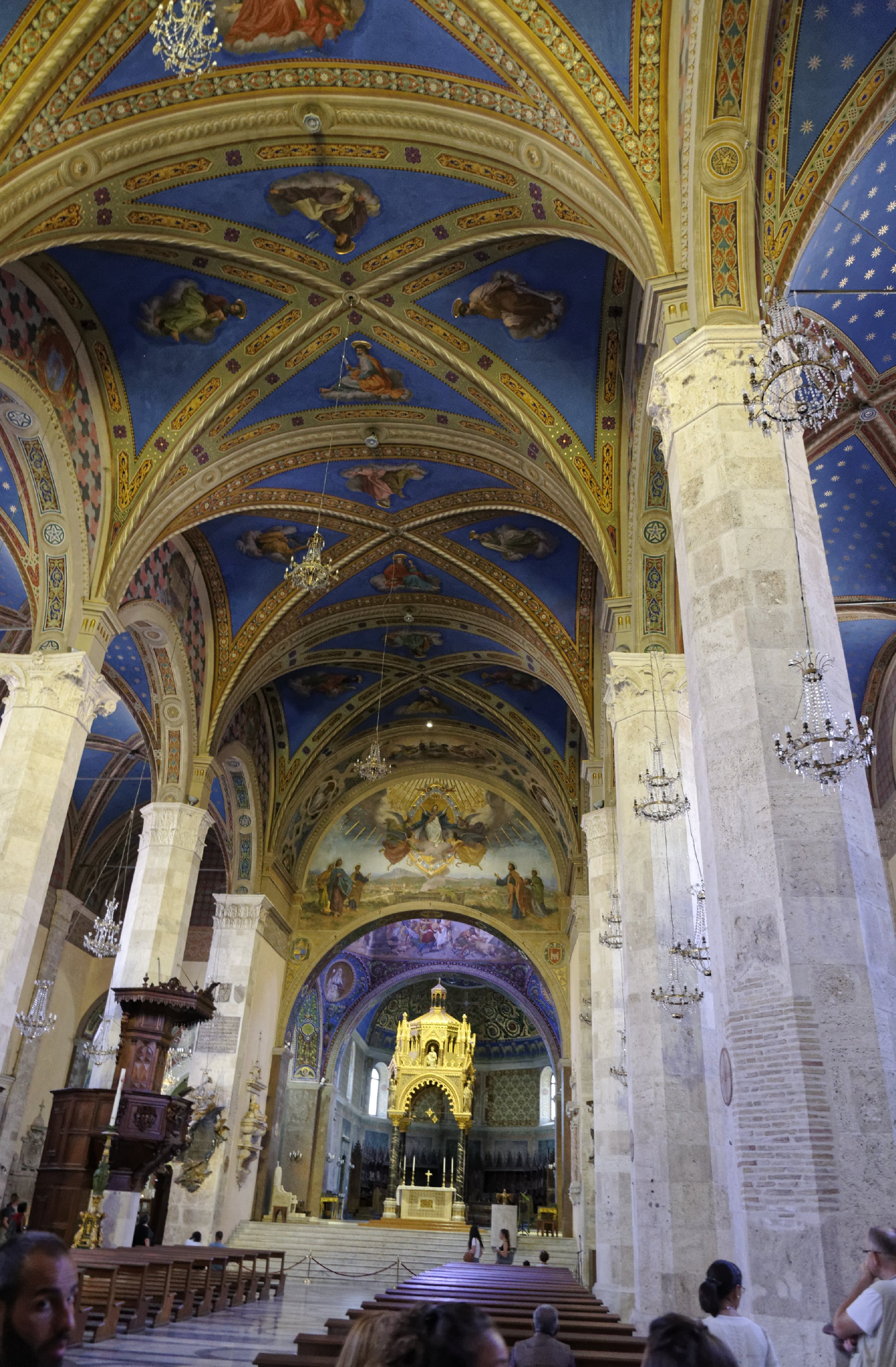 Ascoli Piceno 2015 Dieses Foto entstand in Zusammenarbeit mit Stadtbesichtigungen.de Die Seiten Stadtbesichtigungen.de, der dazugehörige Reise Blog sowie die Facebookseite: Stadtbesichtigungen Rom dürfen dieses Bild für Ihre Veröffentlichungen ohne den Hinweis auf Wikipedia, Commons bzw der Lizenz verwenden. Die Verantwortlichen habe von mir (Ra Boe) die Originaldaten zur freien Verfügung übermittelt bekommen.